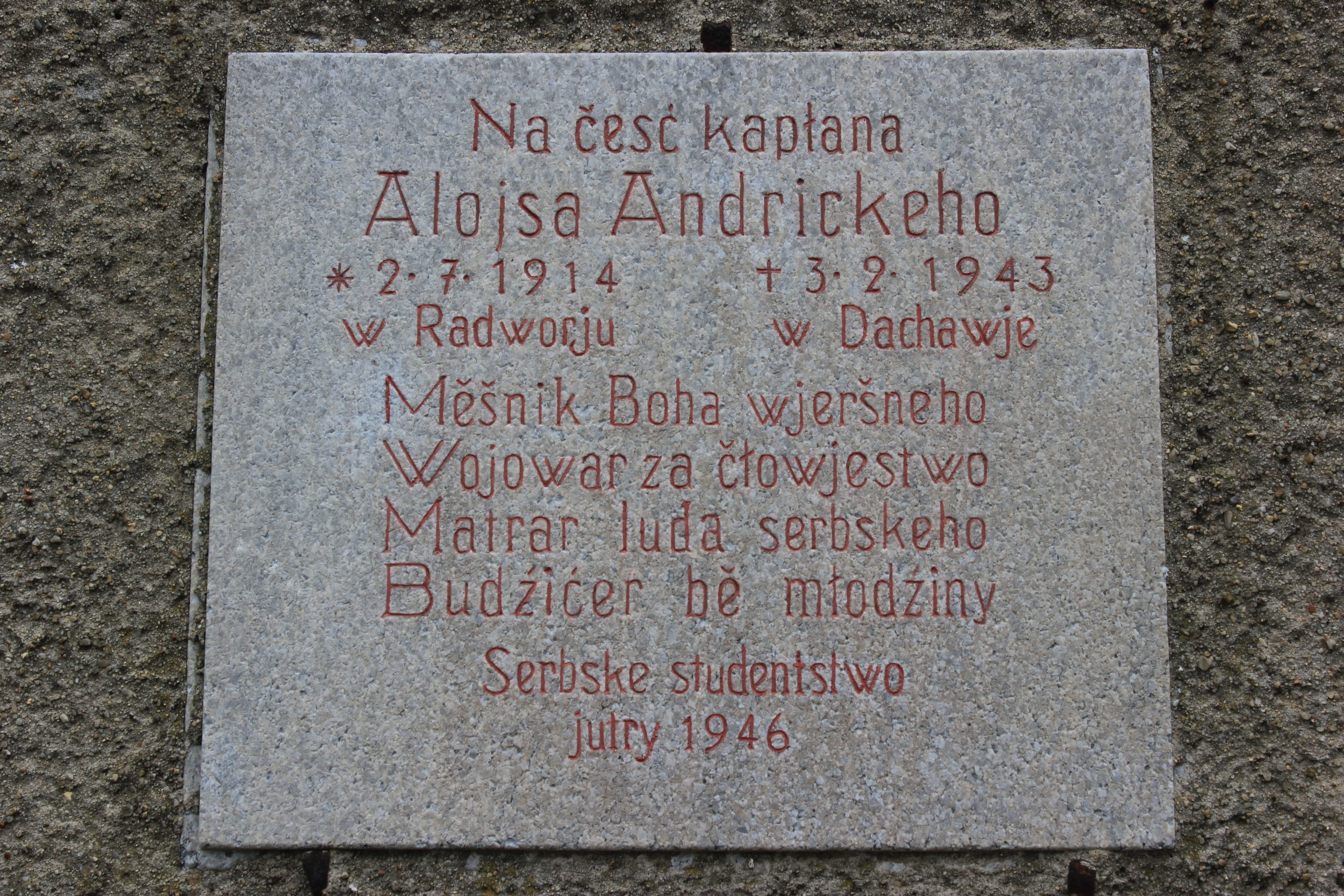 Hornjoserbsce: Na Radworskim kěrchowje; wopomnjenska tafla za Alojsa Andrickeho.